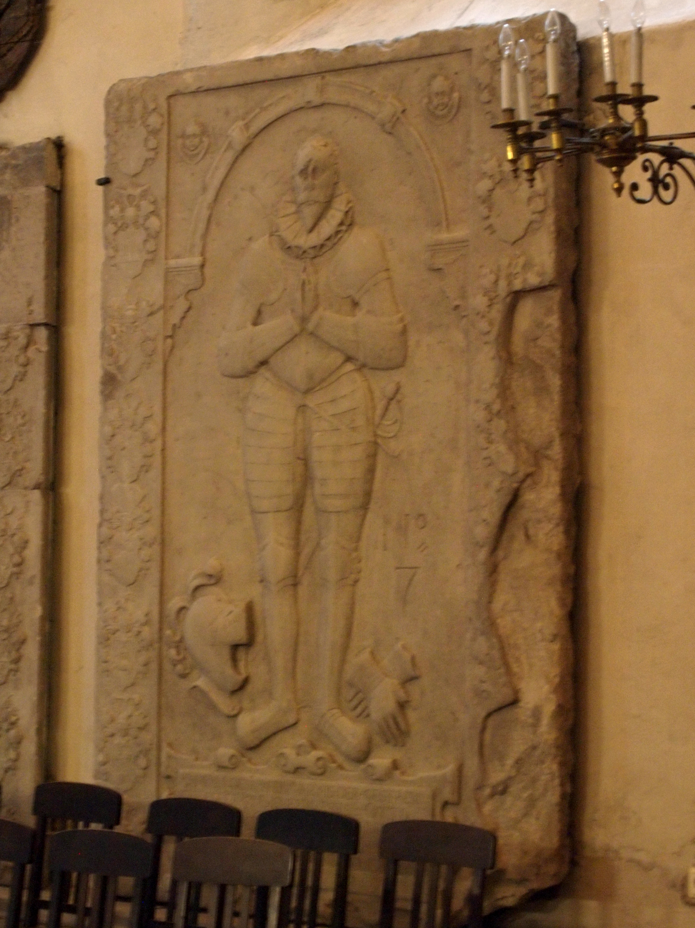 Otto von Uexkülli hauaplaat Tallinna toomkirikus.